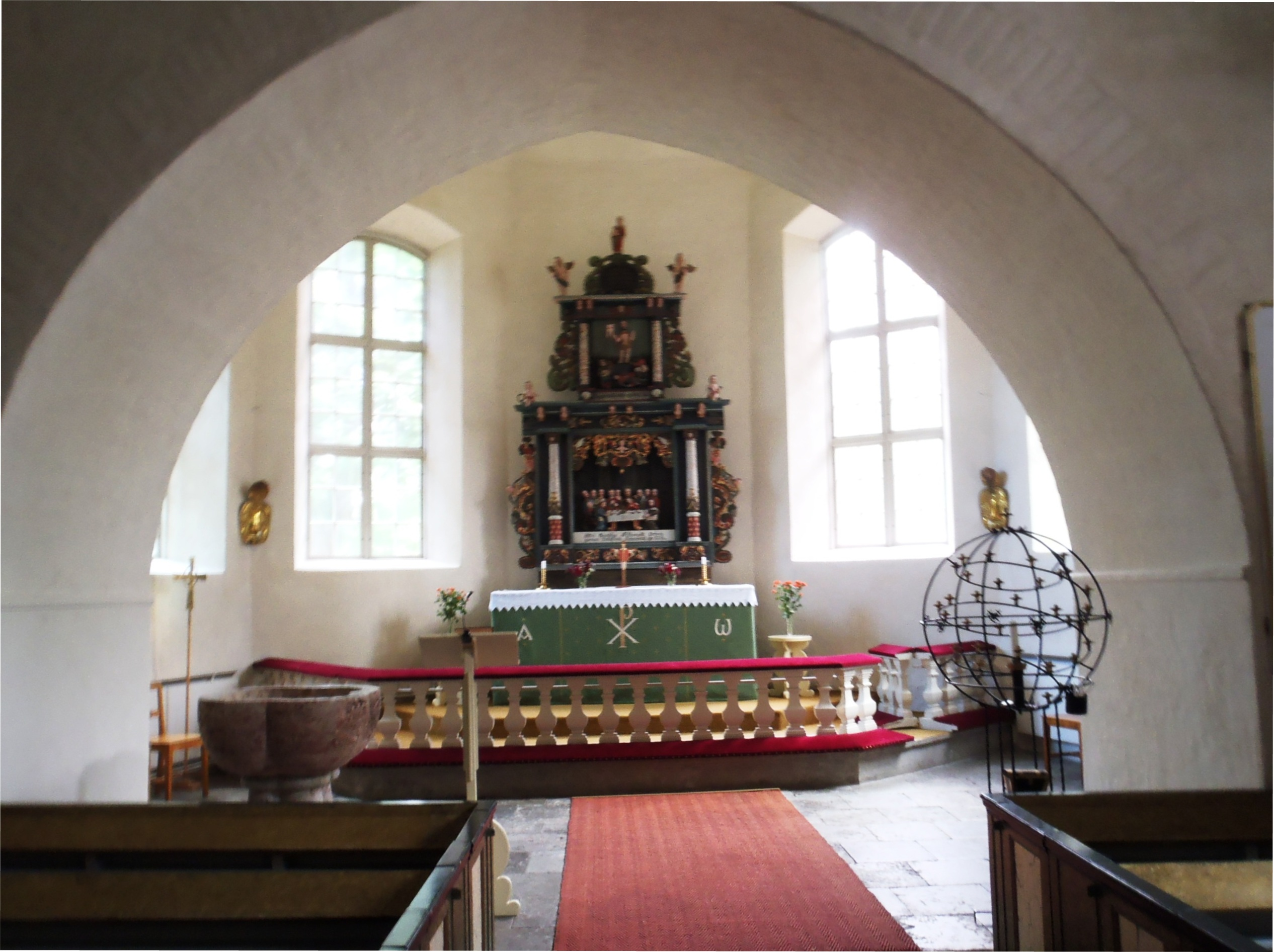 Saltviks kyrka på Åland.